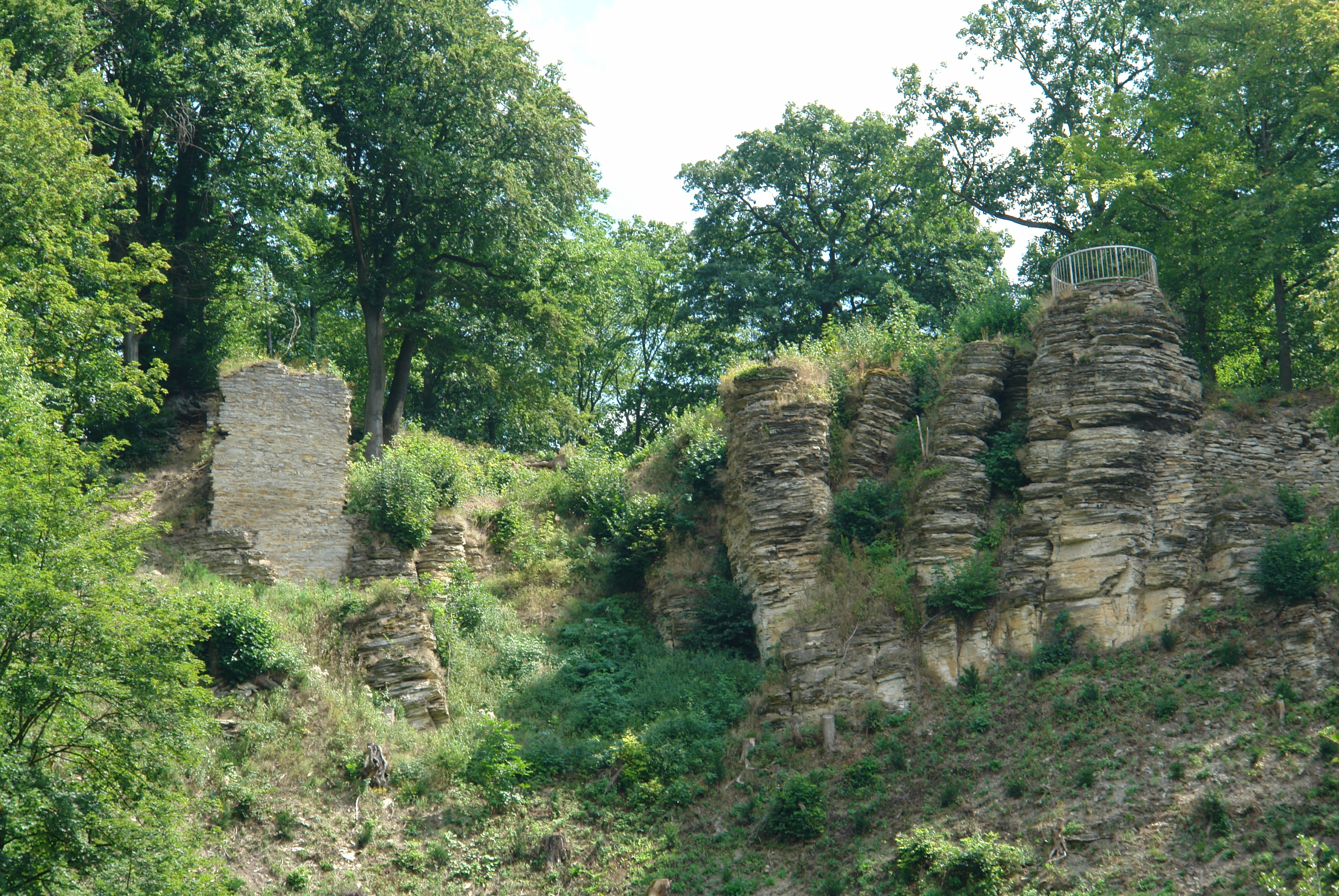 Zřícenina hradu Výrov, Nové Město nad Metují.